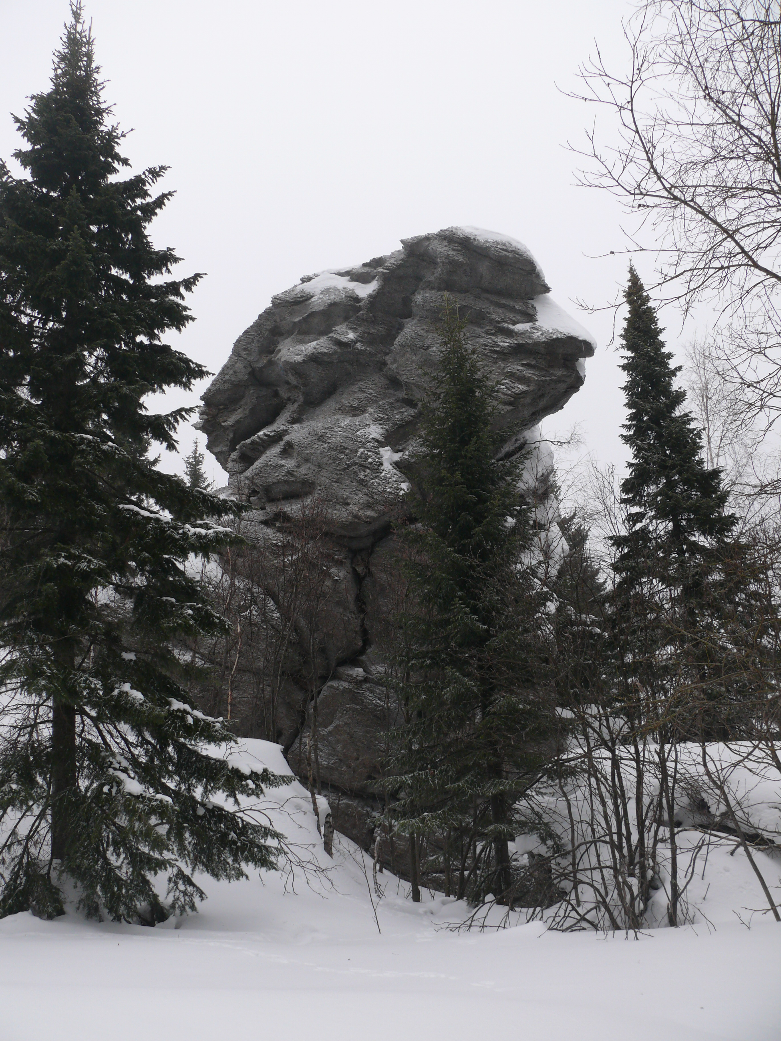 Гора "Старик-камень", Ревда This image is related to the protected area of Russia number 6610554